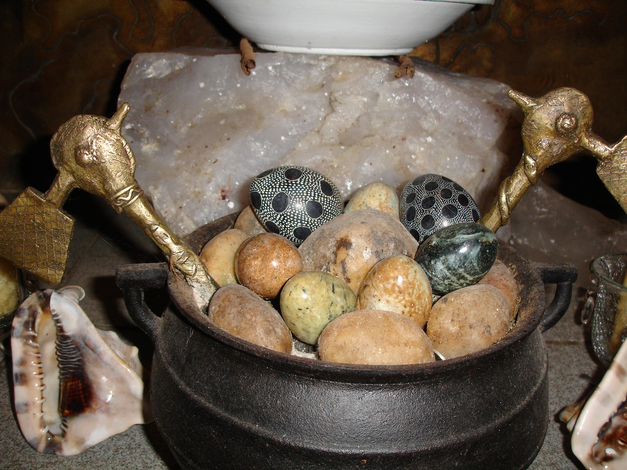 Ojetos sagrados de Ifá Orumila Orossi